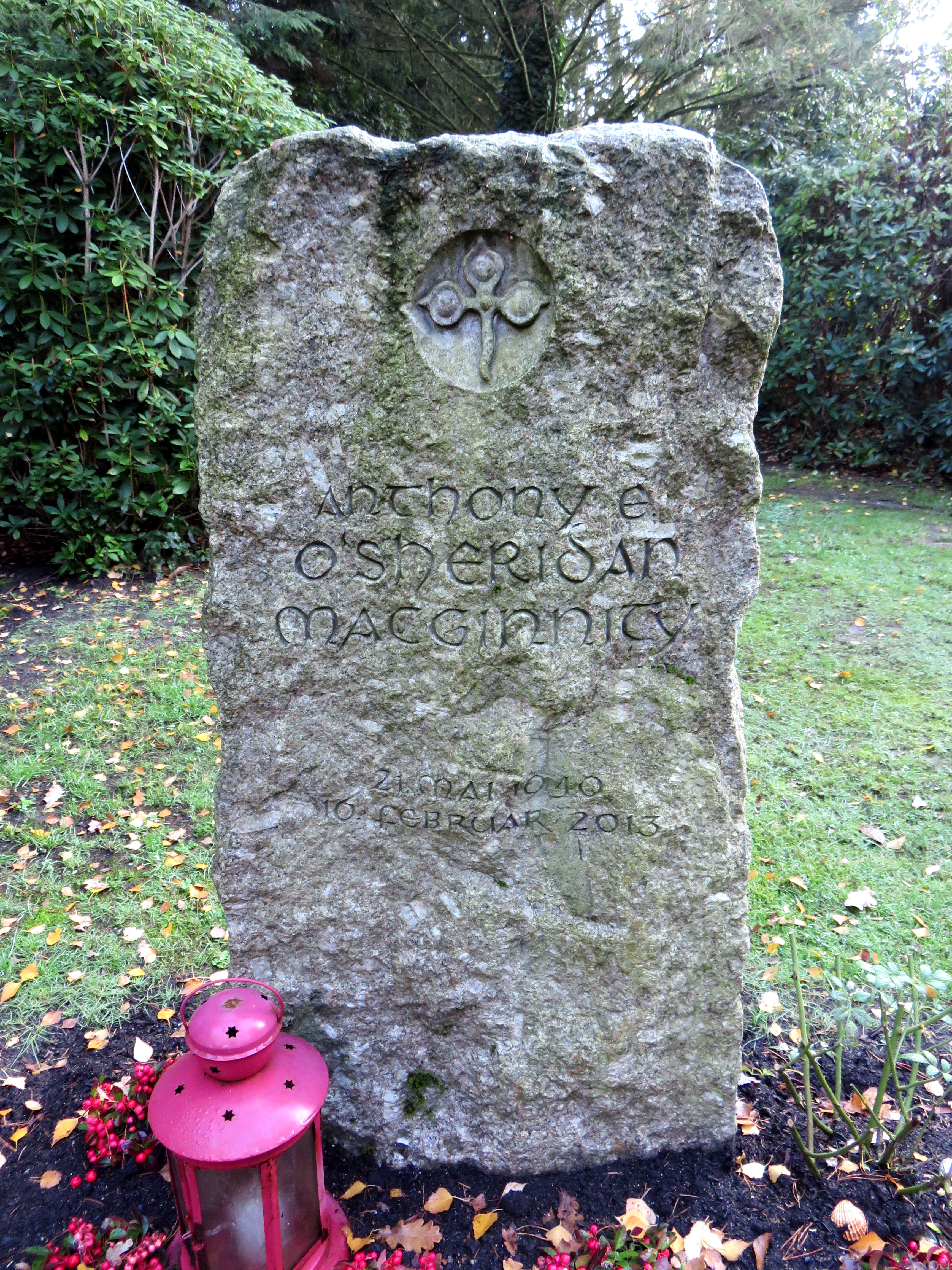 Grab des britischen Musikers Tony Sheridan, ursprünglich „ Anthony Esmond Sheridan McGinnity“, Friedhof Ohlsdorf, Planquadrat AD 14 (nördlich Nordteich).